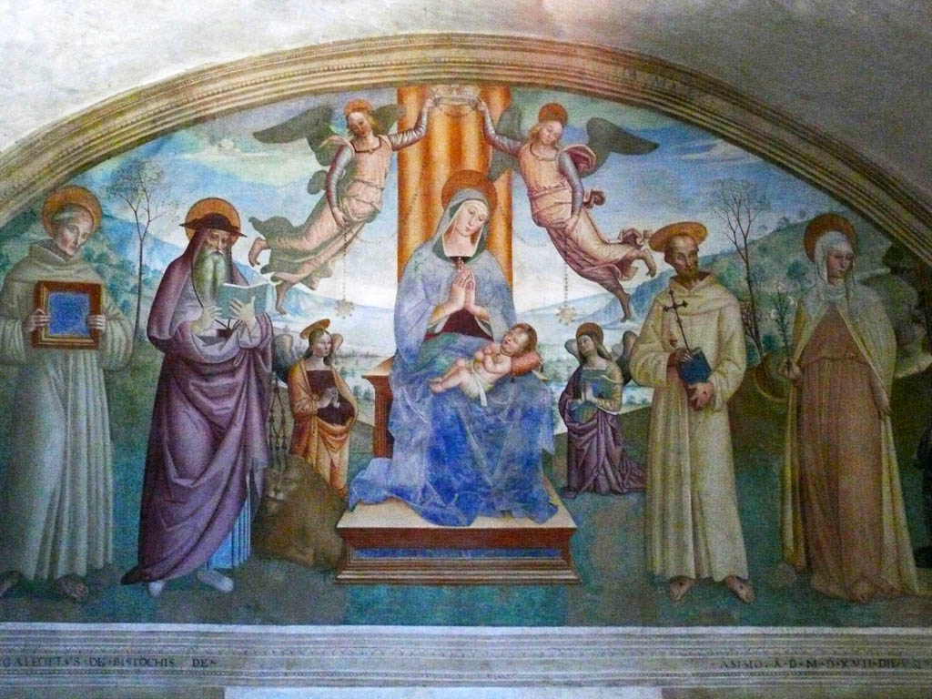 Assisi, San Damiano